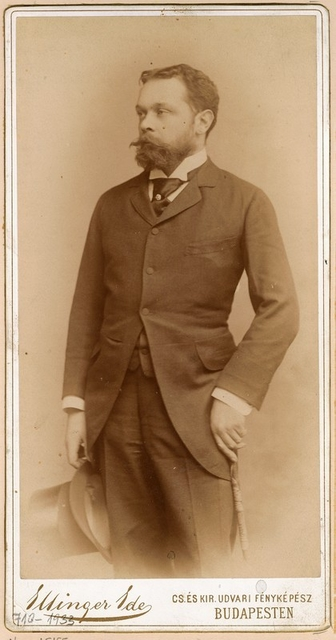 Photo von Ende Ellinger, Budapest um das Jahr 1890